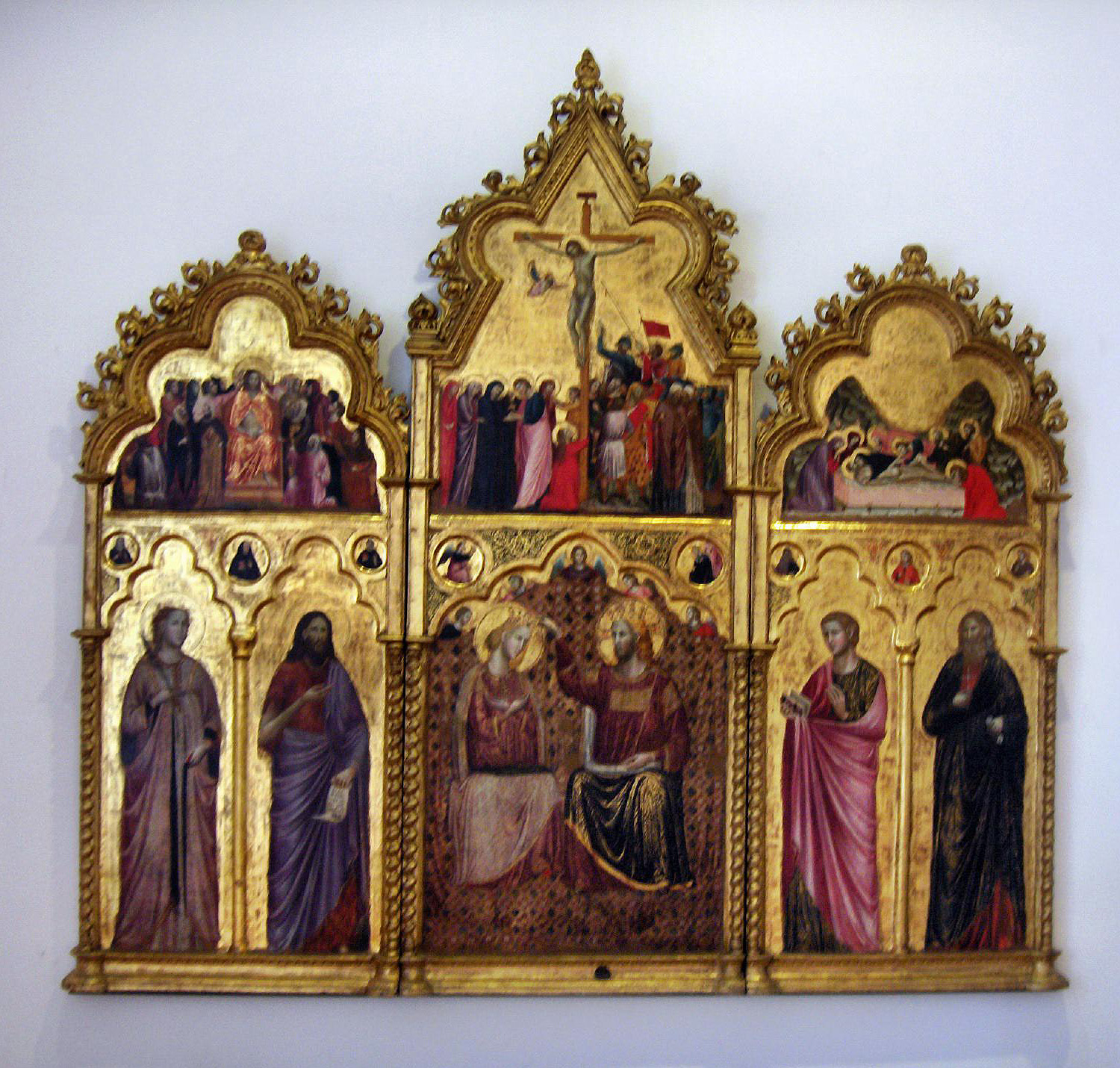 Triptych (il polittico su tavola con L’incoronazione della Vergine, santi e scene della Passione e morte di Cristo,) by Giuliano da Rimini (working between 1307 and 1324)